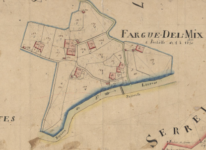 La Farga del Mig de Sant Llorenç de Cerdans en el Cadastre napoleònic del 1812 (Arxius Departamentals dels Pirineus Orientals)